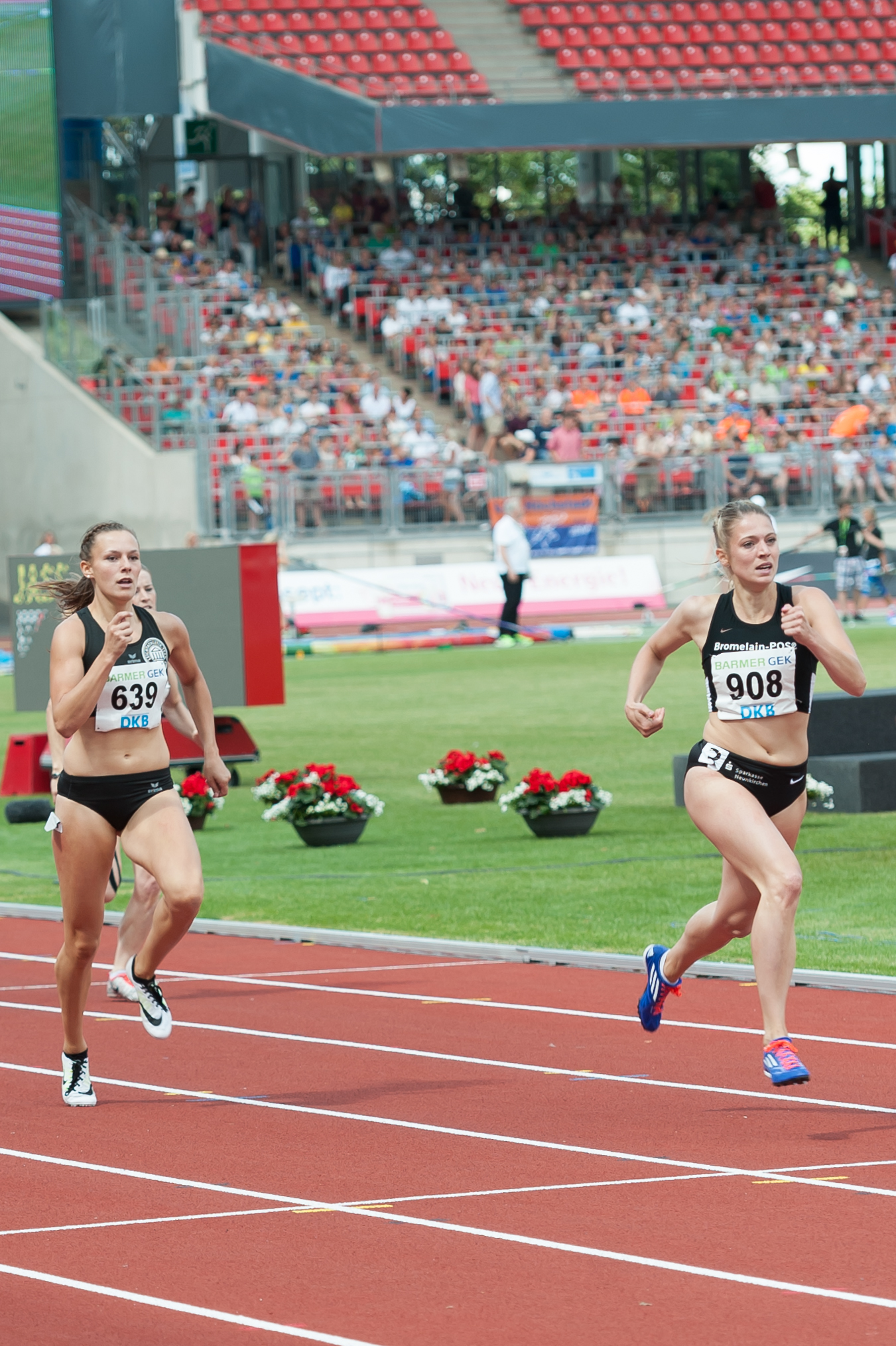 Deutsche Leichtathletik-Meisterschaften 2015: Frauen 400m - Friederike Möhlenkamp, Luisa Valeske